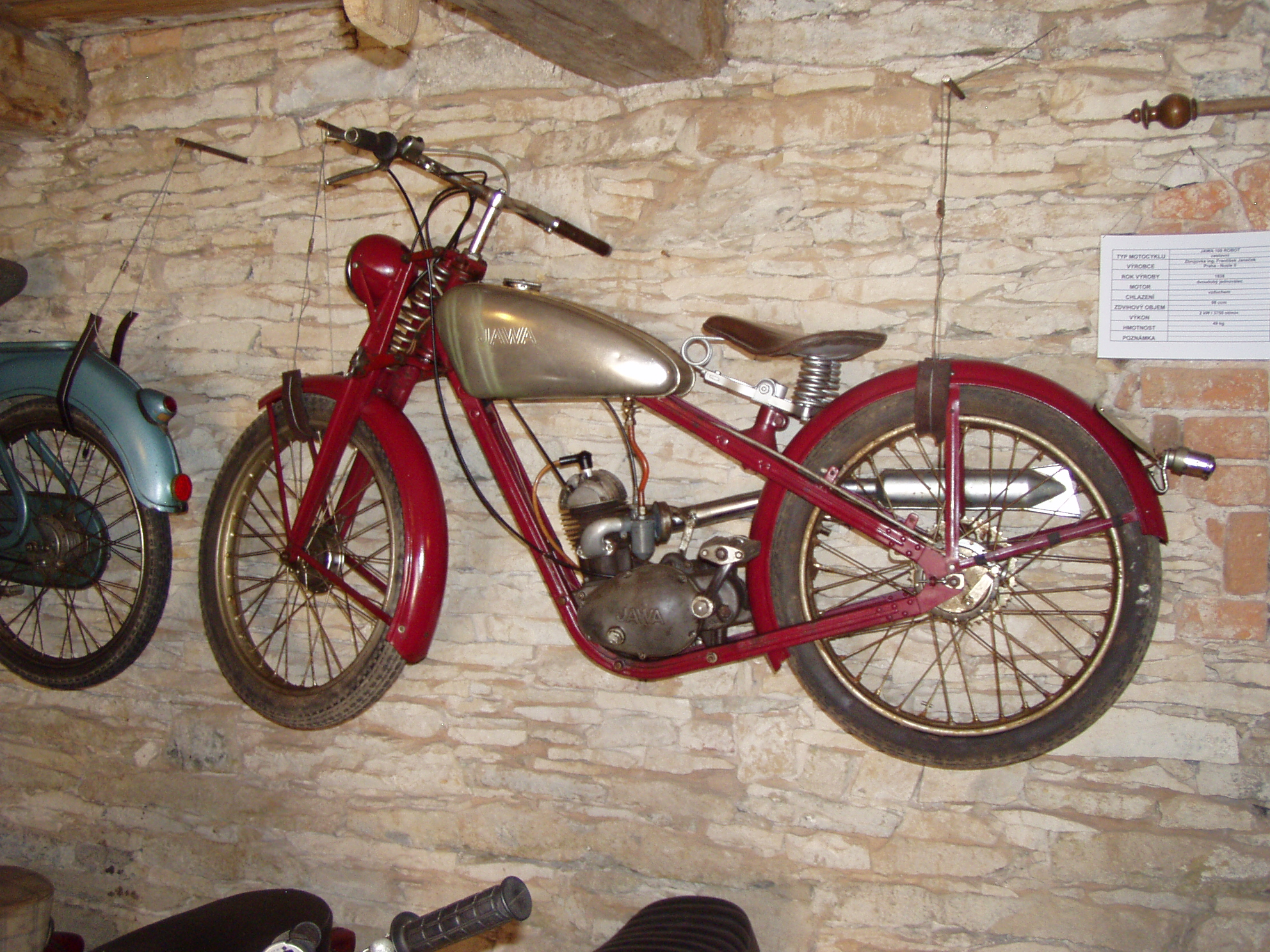 Jawa 100 Robot (1938)